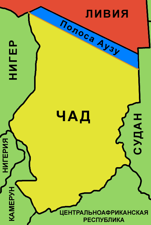 Полоса Аузу на территории республики Чад